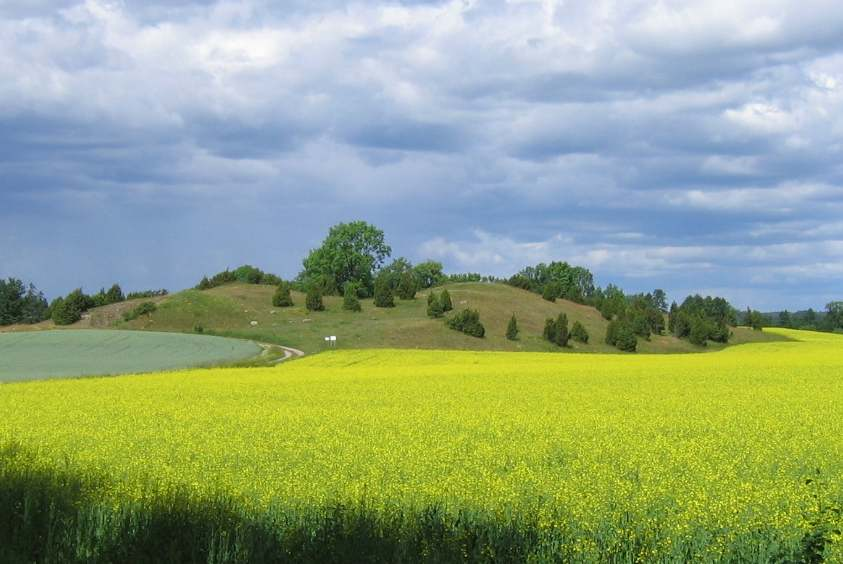 Valsgärde, grave field